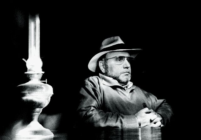 Evgen Bavcar autoportrait